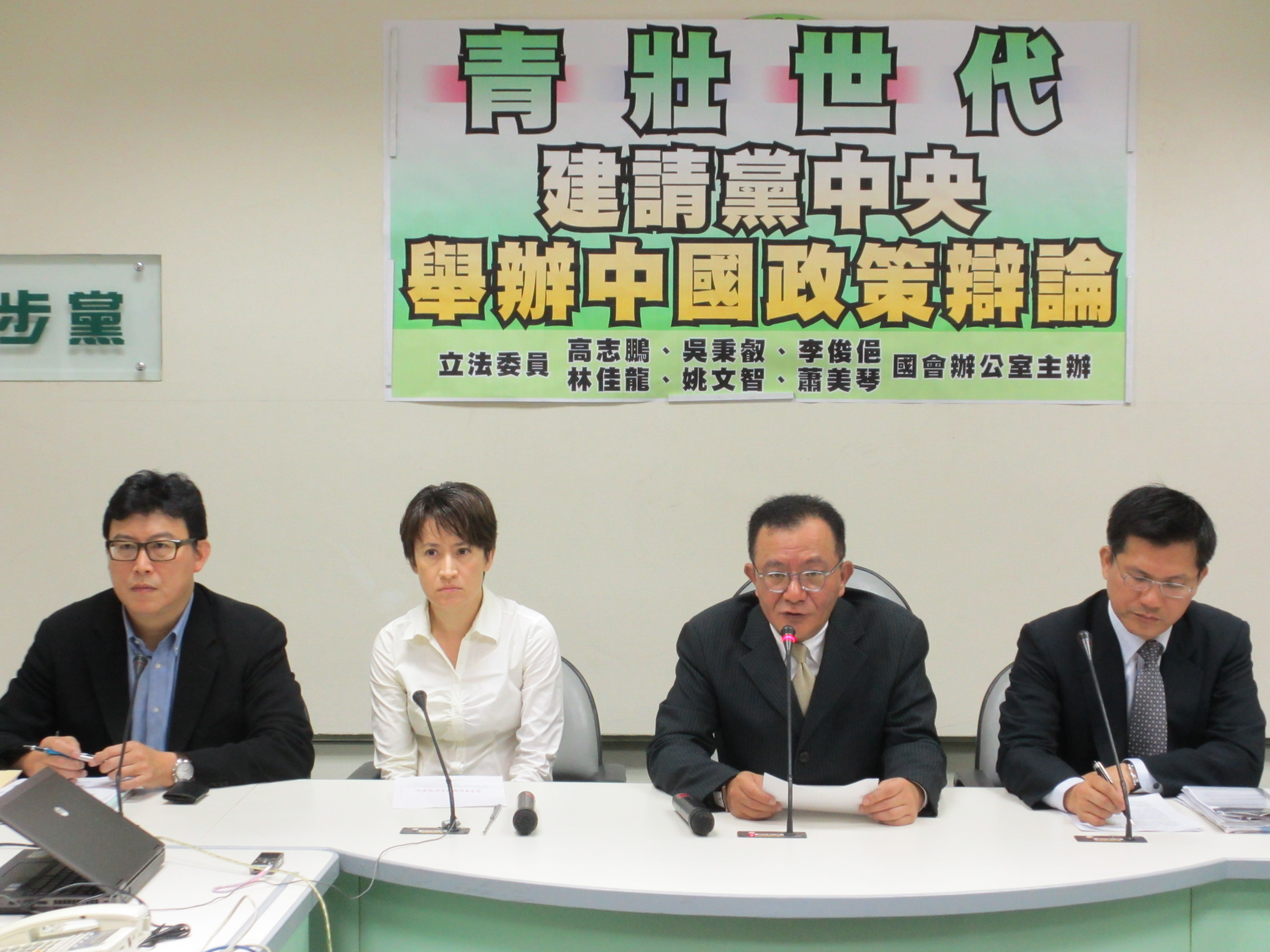 民主進步黨立法委員姚文智、蕭美琴、高志鵬、林佳龍於民主進步黨立法院黨團辦公室舉行「青壯世代建請黨中央舉辦中國政策辯論」記者會。